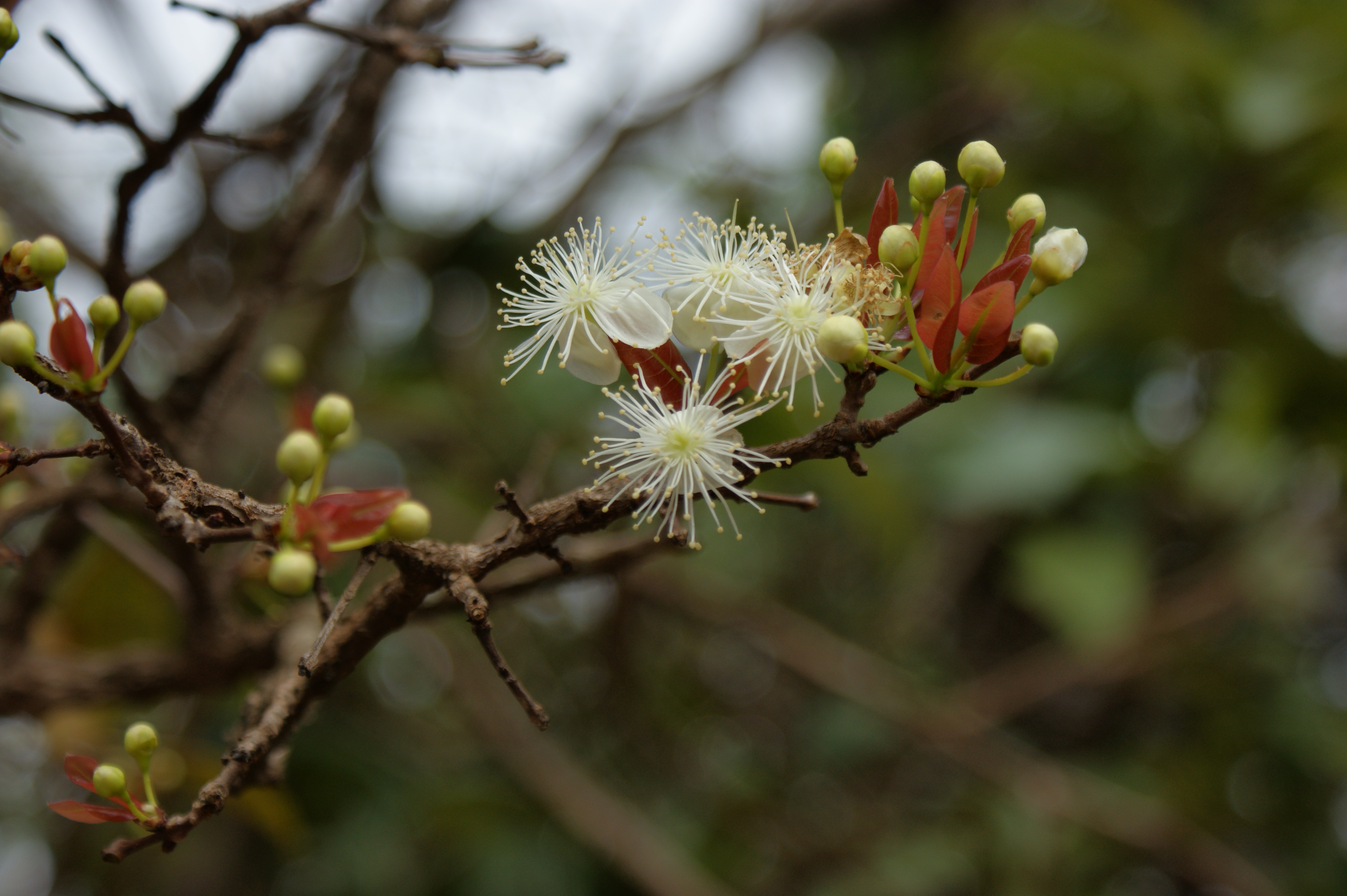 Eugenia dysenterica - MYRTACEAE Jardim Botanico de Brasília - Brasília - DF - Brasil